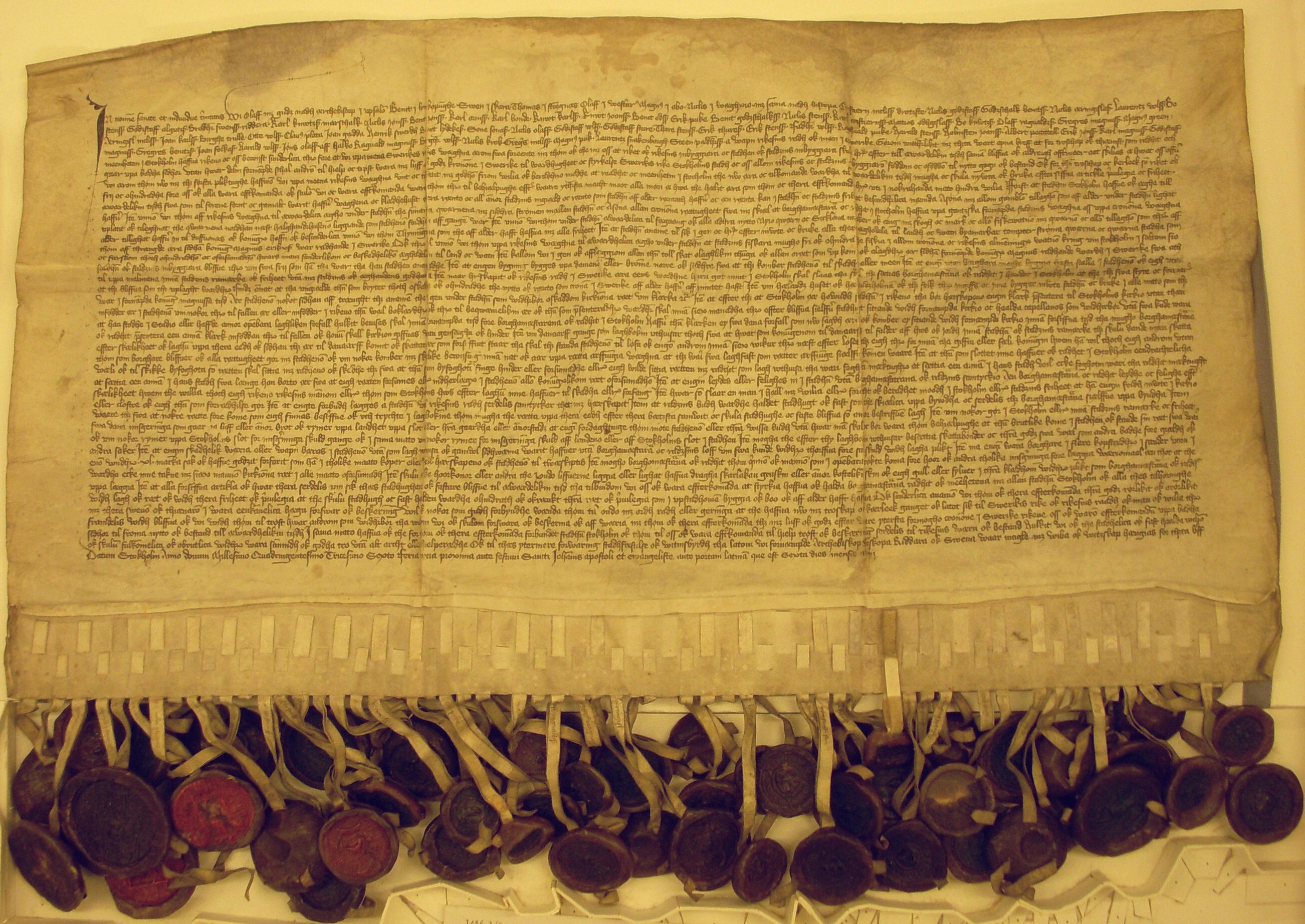 Stockholms previlegiebrev från 1 maj 1436